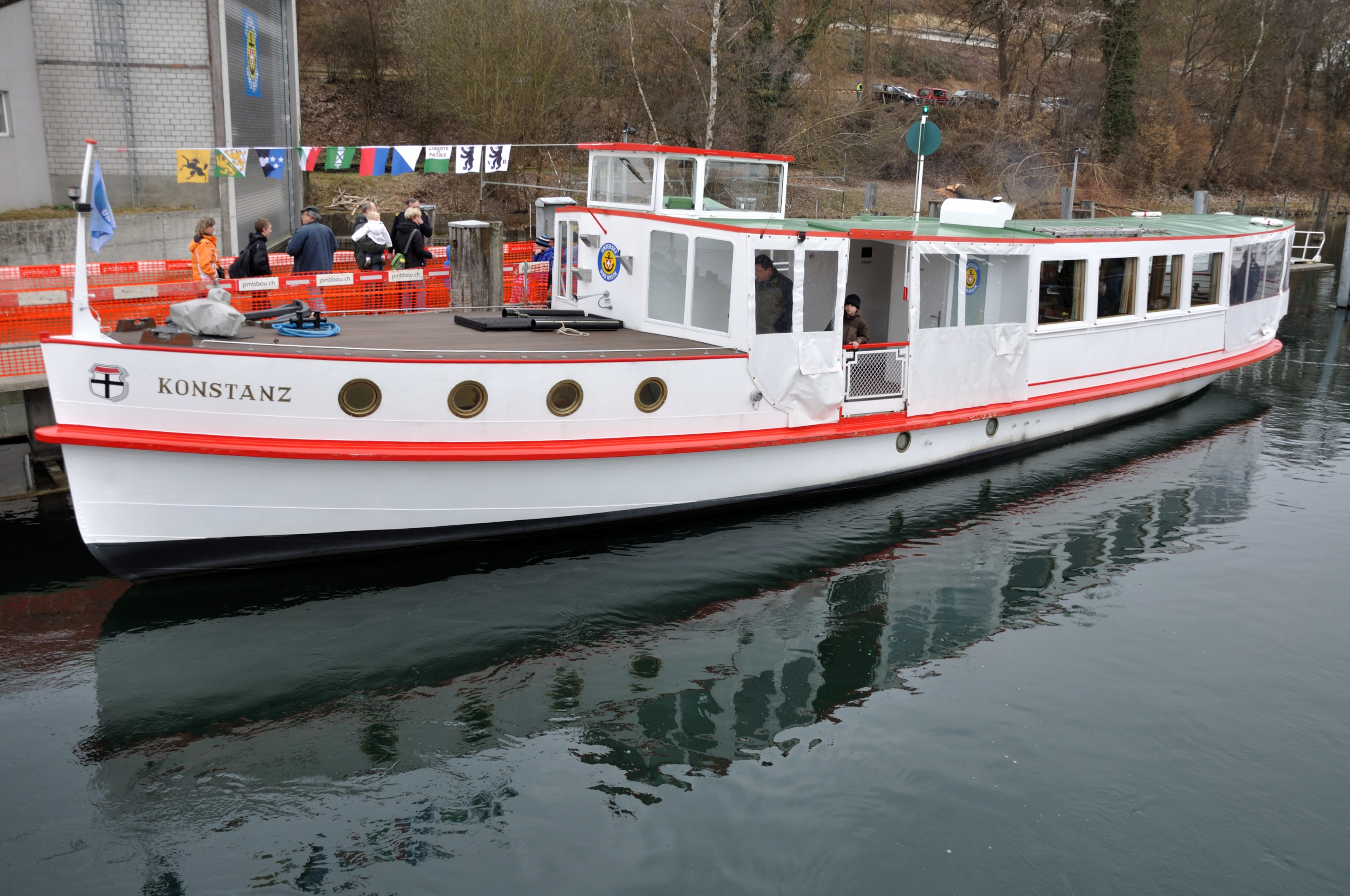 Switzerland, Canton of Zürich, Wharf of Schifffahrtsgesellschaft Untersee und Rhein in Langwiesen